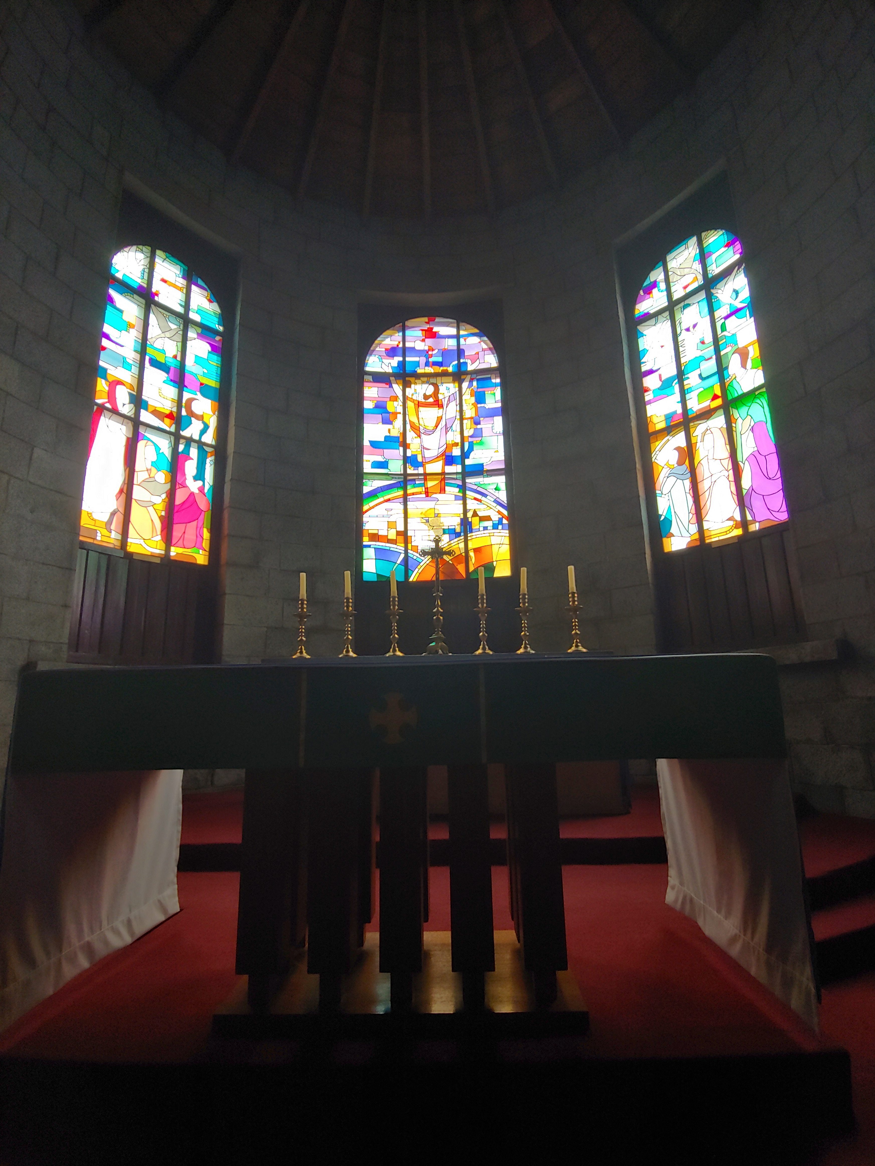 성공회 내동교회 대성전의 제대